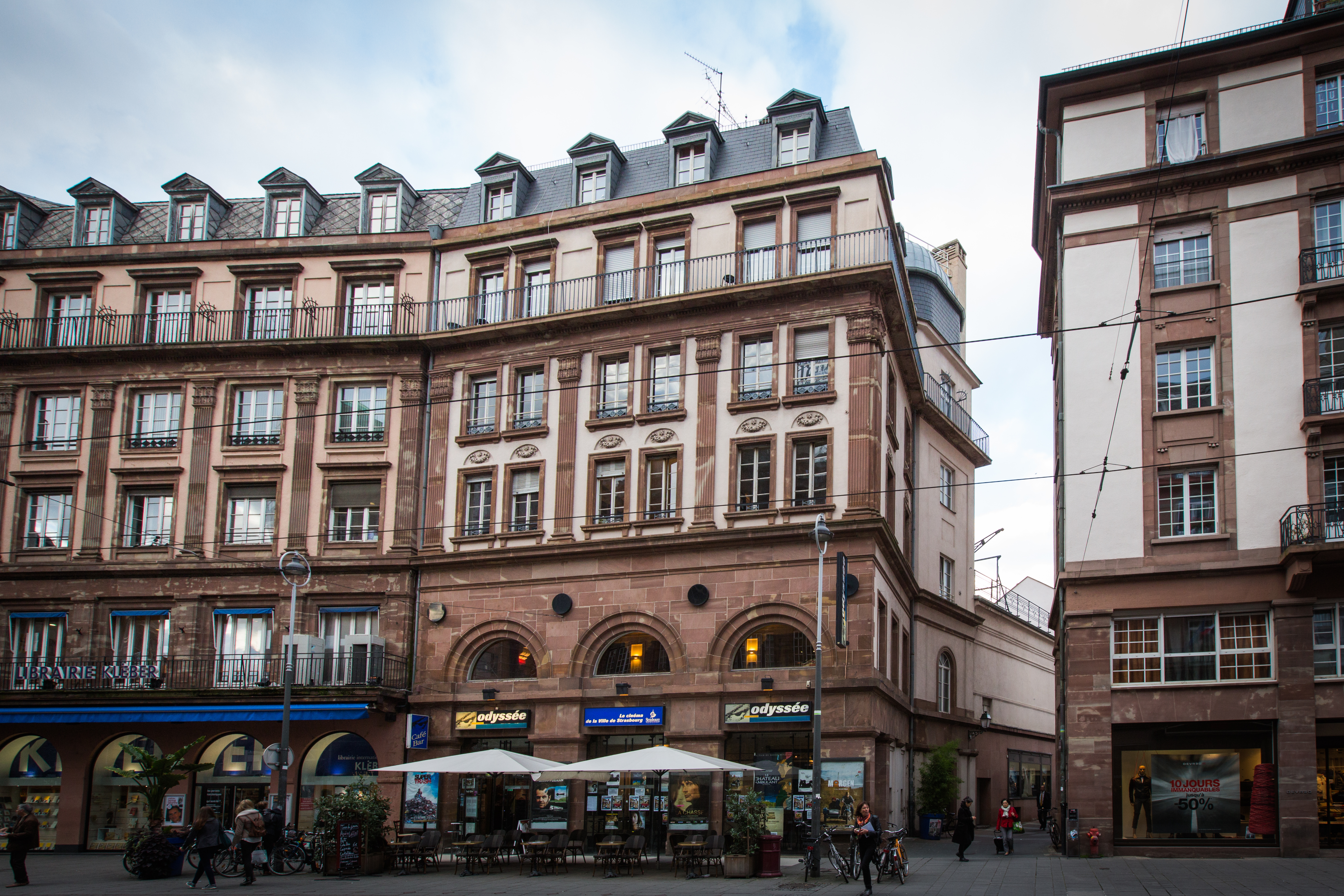 Strasbourg 3 rue des Francs-Bourgeois cinéma Odyssée octobre 2013